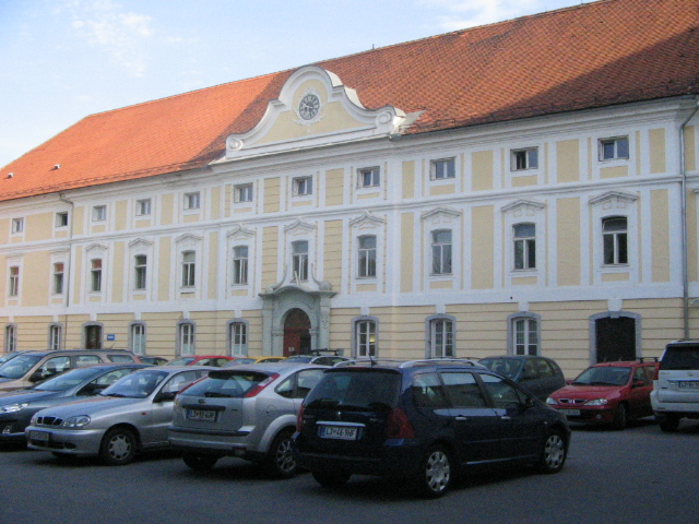 Dvorec Selo, Ljubljana.